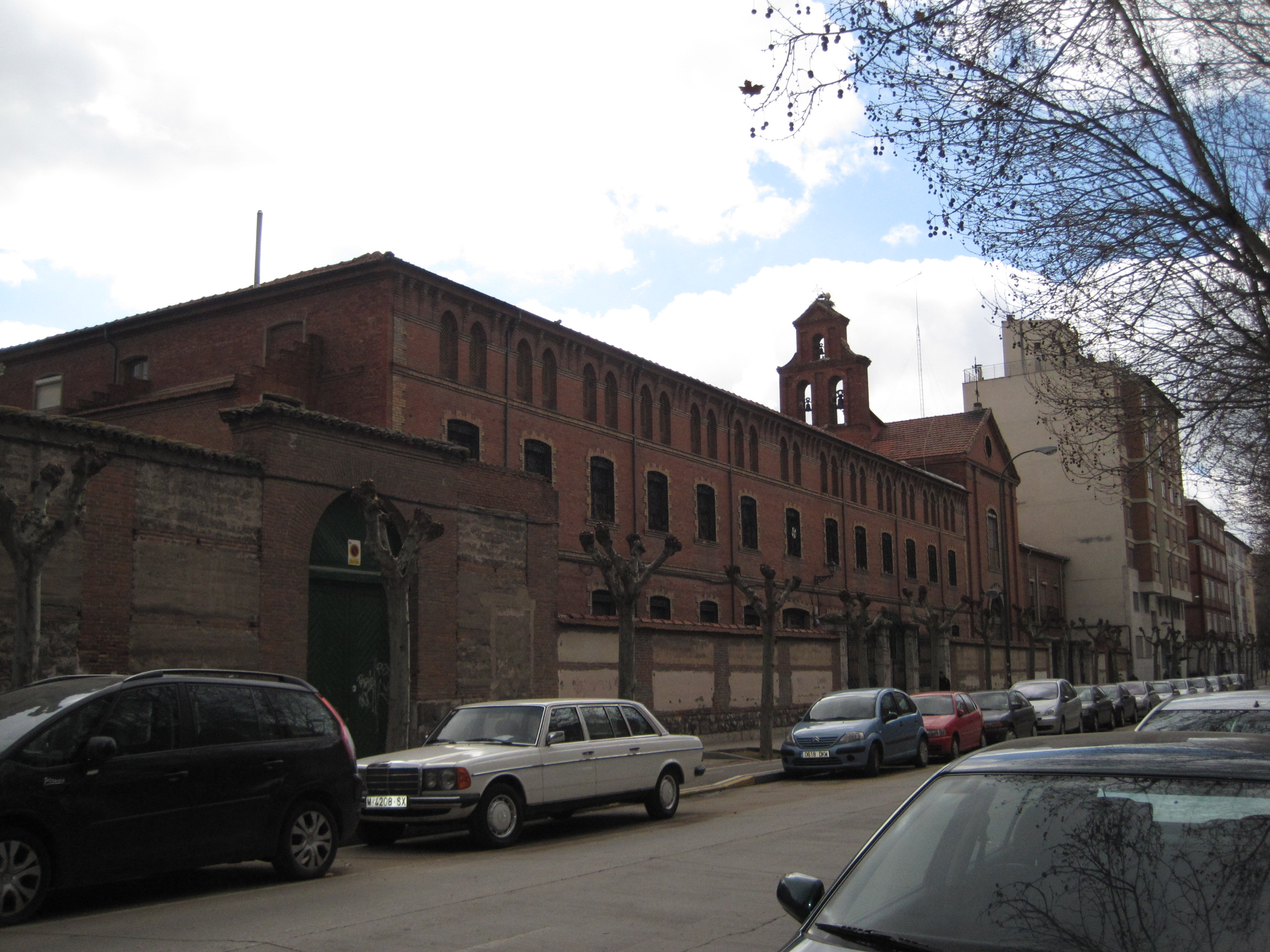 Vista exterior del convento de Corpus Christi, Valladolid (España).